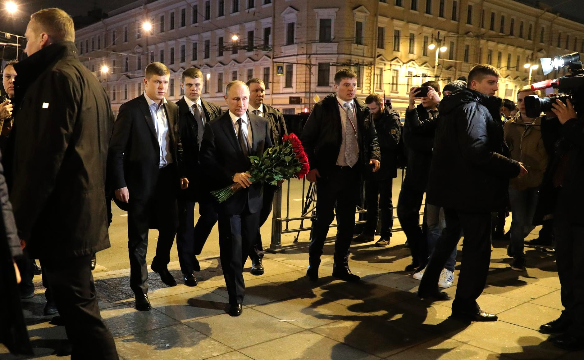 Президент России Владимир Путин почтил память погибших при взрыве в метро Санкт-Петербурга. Возле станции метро «Технологический институт»